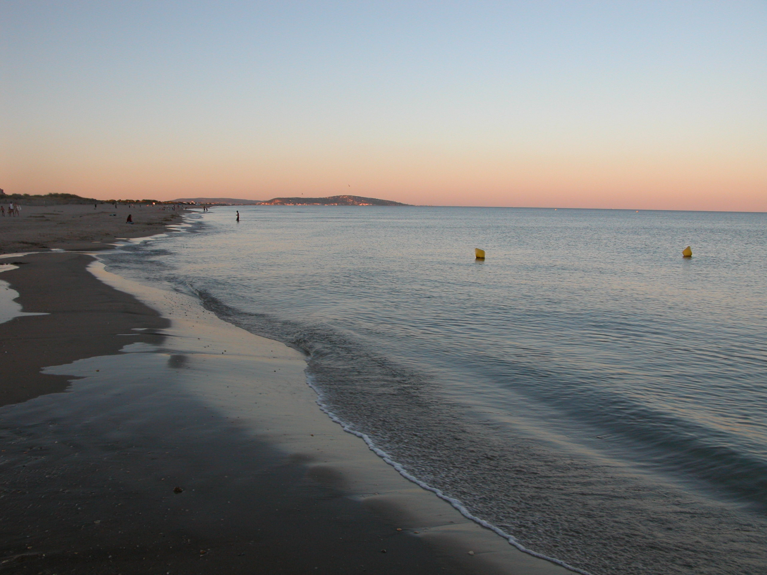 La plage de Marseillan-Plage ; à l'horizon, Sète et le Mont Saint-Clair - Photo personnelle.